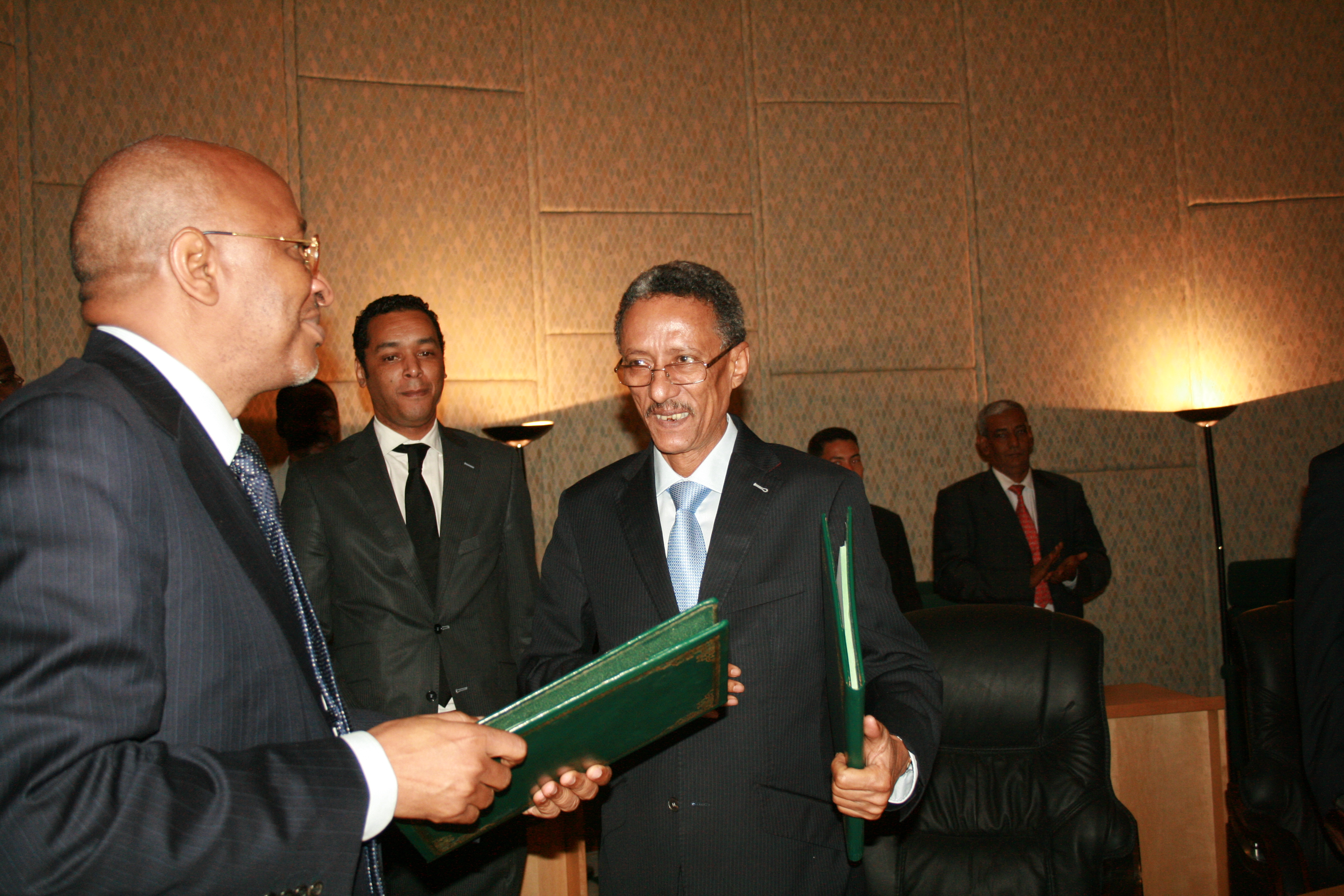 [Jemal Oumar] Mauritanian Foreign Minister Hamadi Ould Hamadi (right) and Malian Foreign Minister Soumeylou Boubeye Maiga met in Nouakchott to discuss security collaboration. وزير الخارجية الموريتاني حمادي ولد حمادي (يمين) ووزير الخارجية المالي سوميلو بوباي مايغا يجتمعان في نواكشوط لمناقشة التعاون الأمني Le ministre mauritanien des Affaires étrangères Hamadi Ould Hamadi (à droite) et son homologue malien Soumeylou Boubeye Maiga se sont rencontrés à Nouakchott pour parler de la collaboration en matière de sécurité.